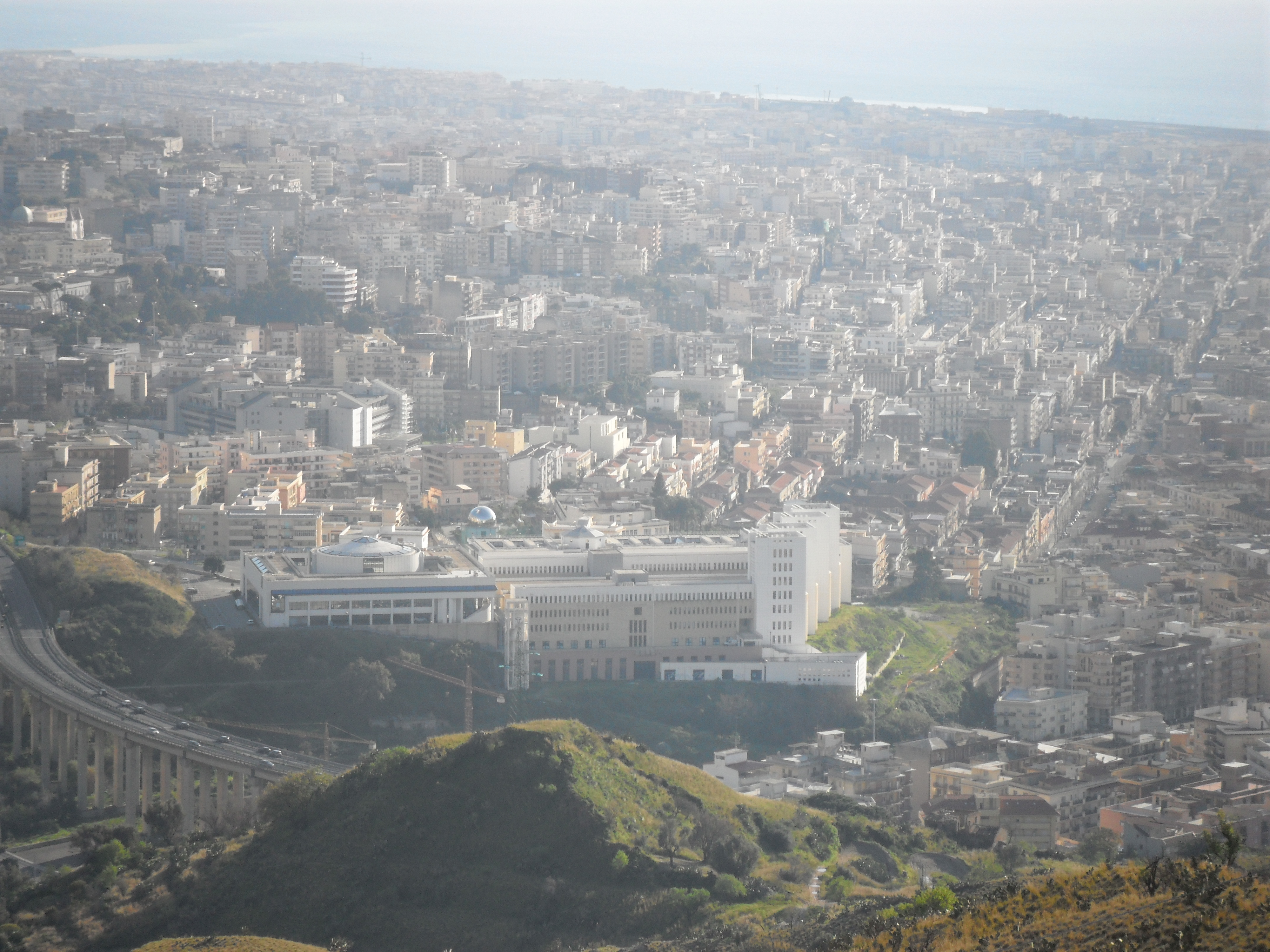 Centro di Reggio visto dalla collina di Pentimele